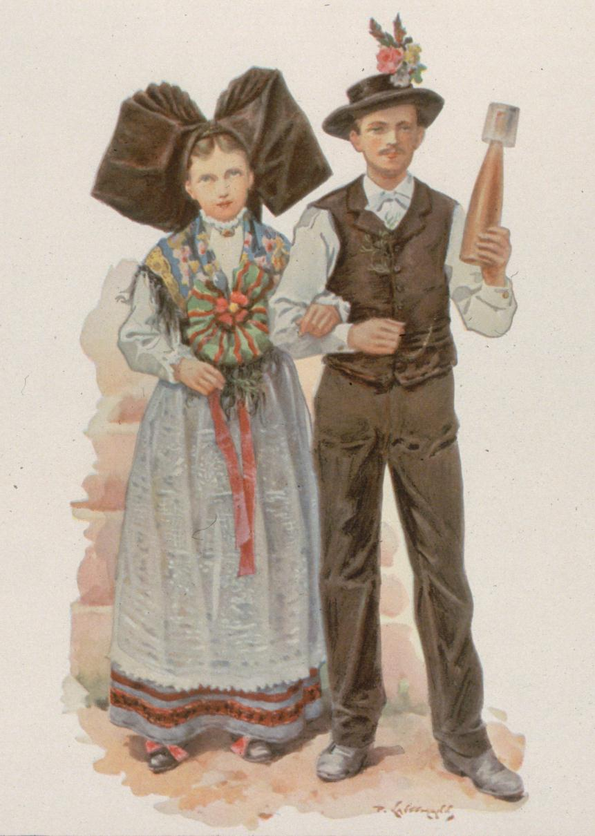 Costume folklorique porté lors du Messti (fête villageoise) à Alteckendorf. Aquarelle de Paul Kauffmann